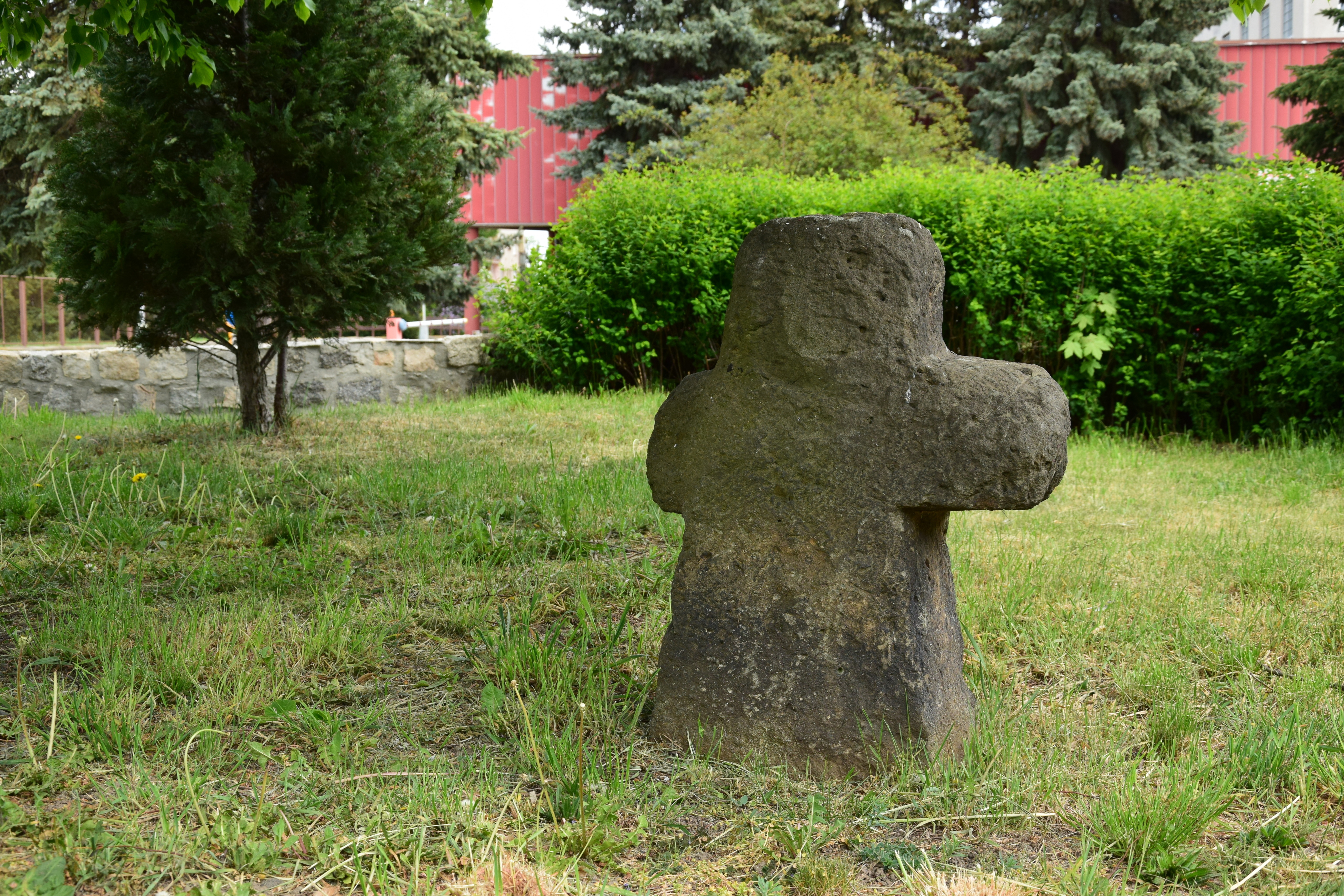 Všehrdy – smírčí kříž u autobusové zastávky